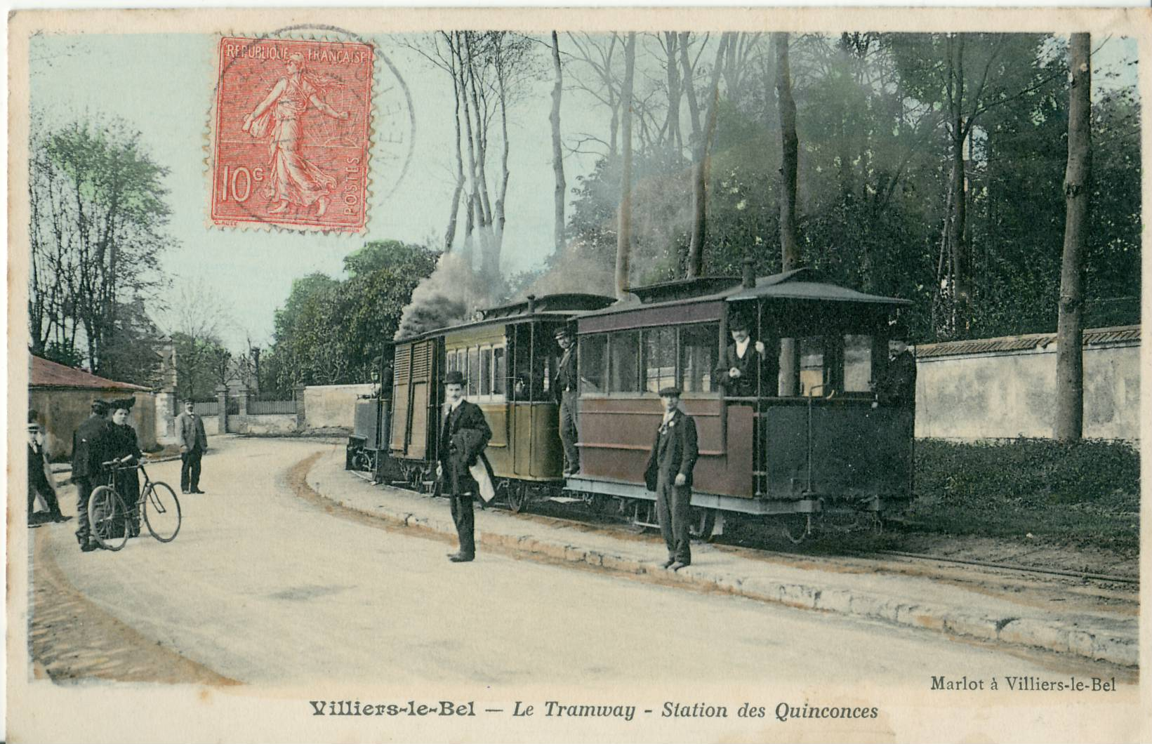 Carte postale ancienne éditée par Marlot VILLIERS-LE-BEL - Le Tramway - Station des Quinconces